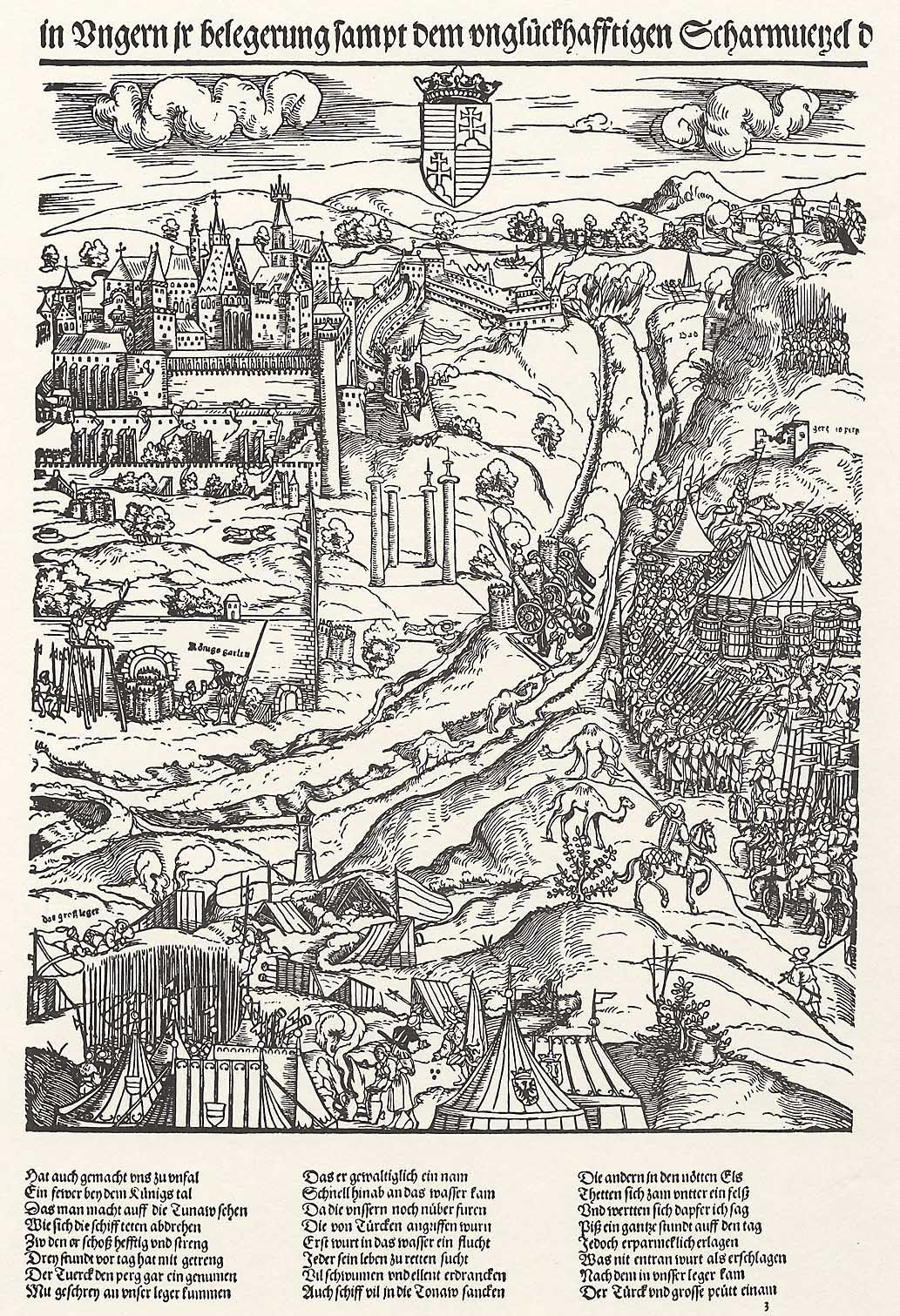 Siege of Buda (1541)